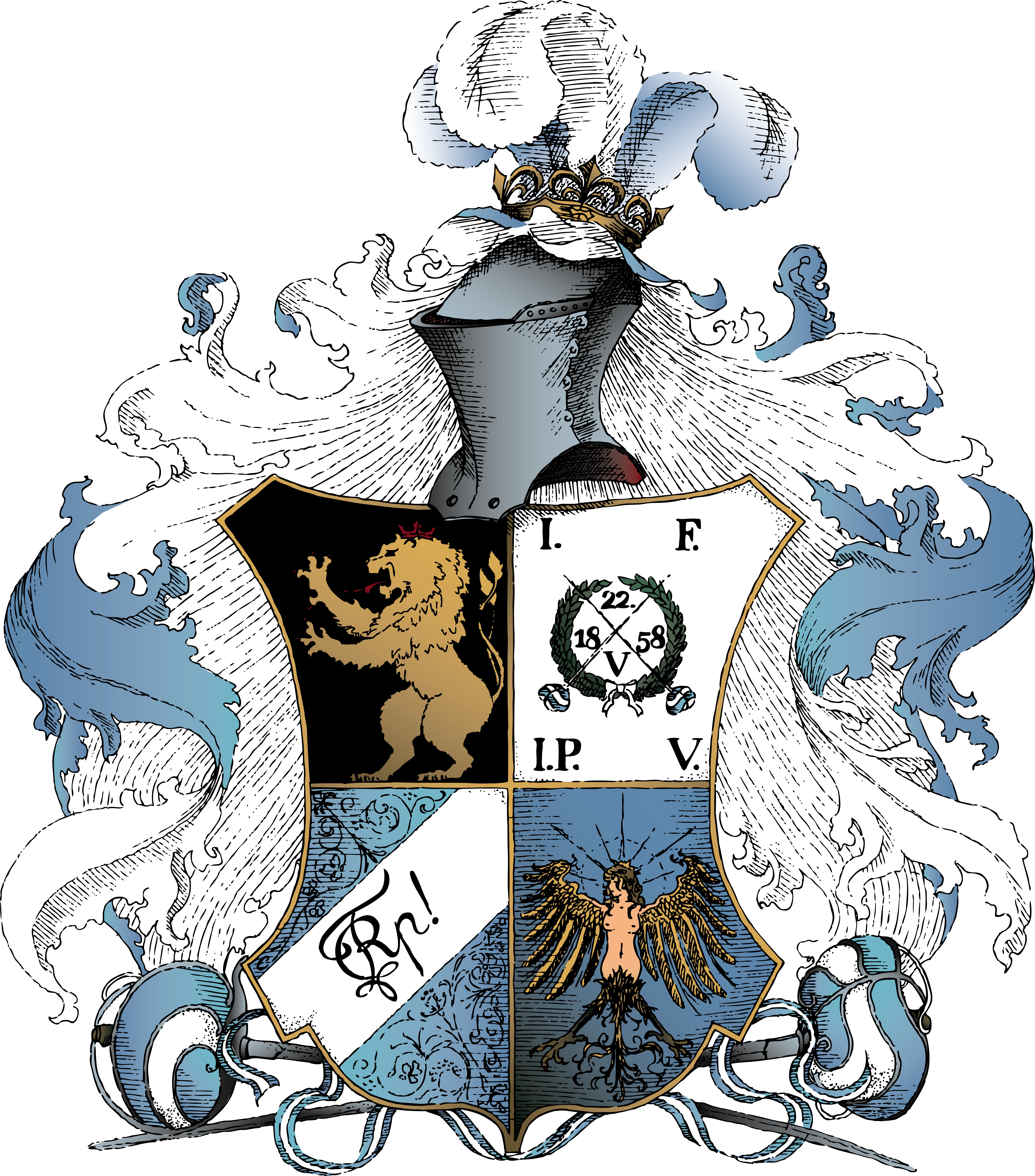 Studentenwappen des Corps Rheno-Palatia München